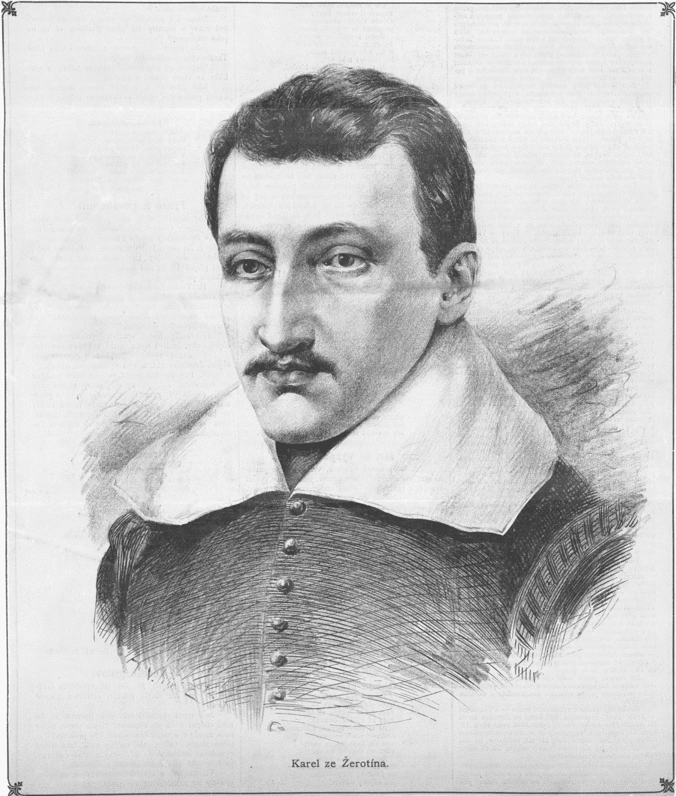 Portrét Karla staršího ze Žerotína